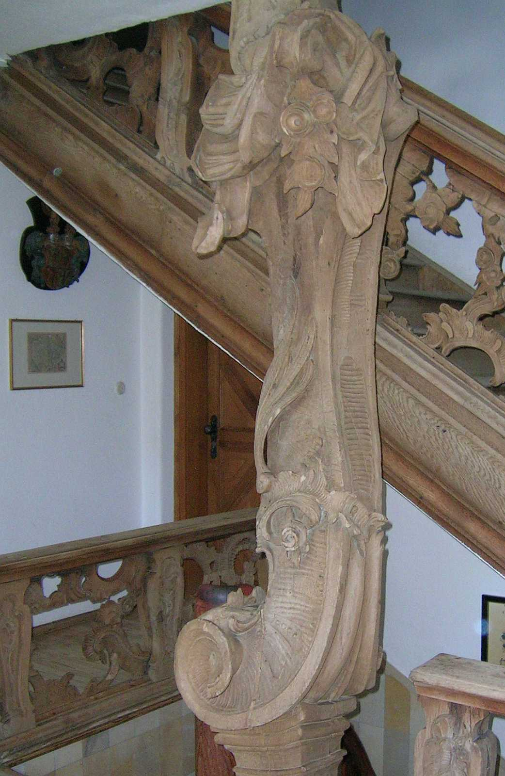 Ehm. Schloss Sandelzhausen, Stadt Mainburg: RokokotreppeThis is a photograph of an architectural monument.